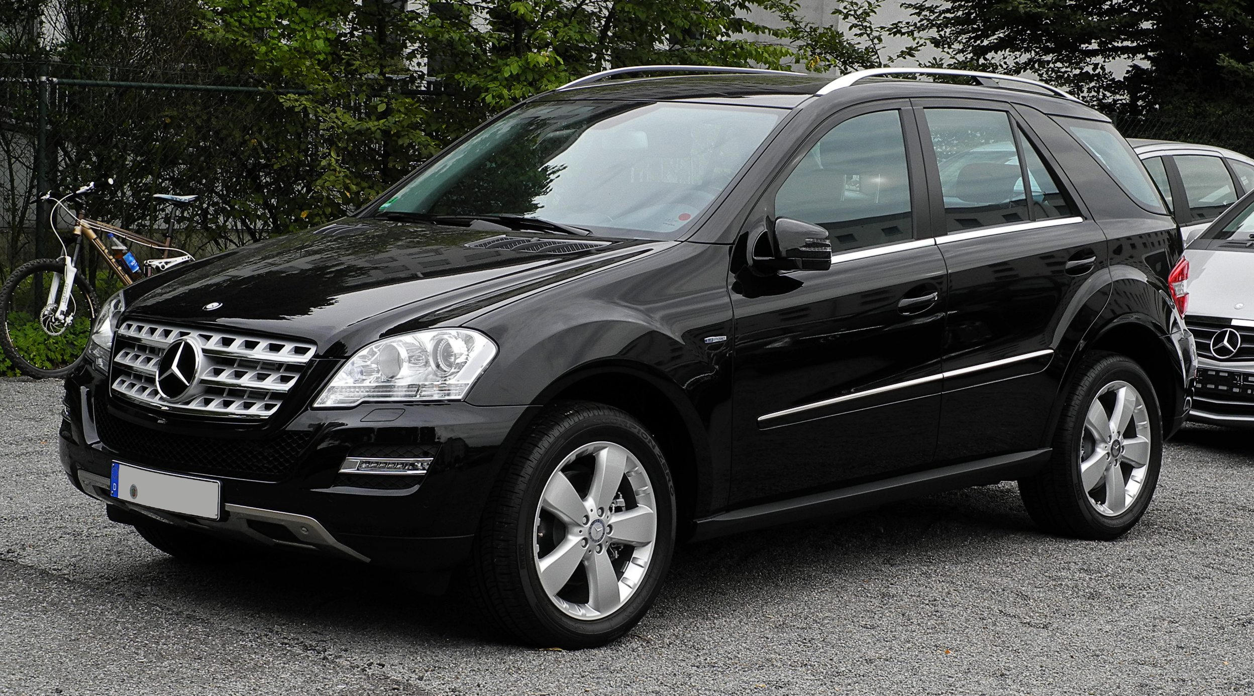 Mercedes-Benz ML 300 CDI BlueEFFICIENCY 4MATIC (W 164, Facelift)